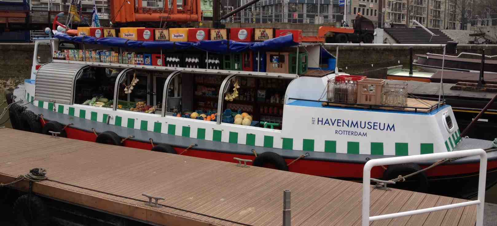 Parlevinker "Time is Money". Gezien bij het Havenmuseum te Rotterdam